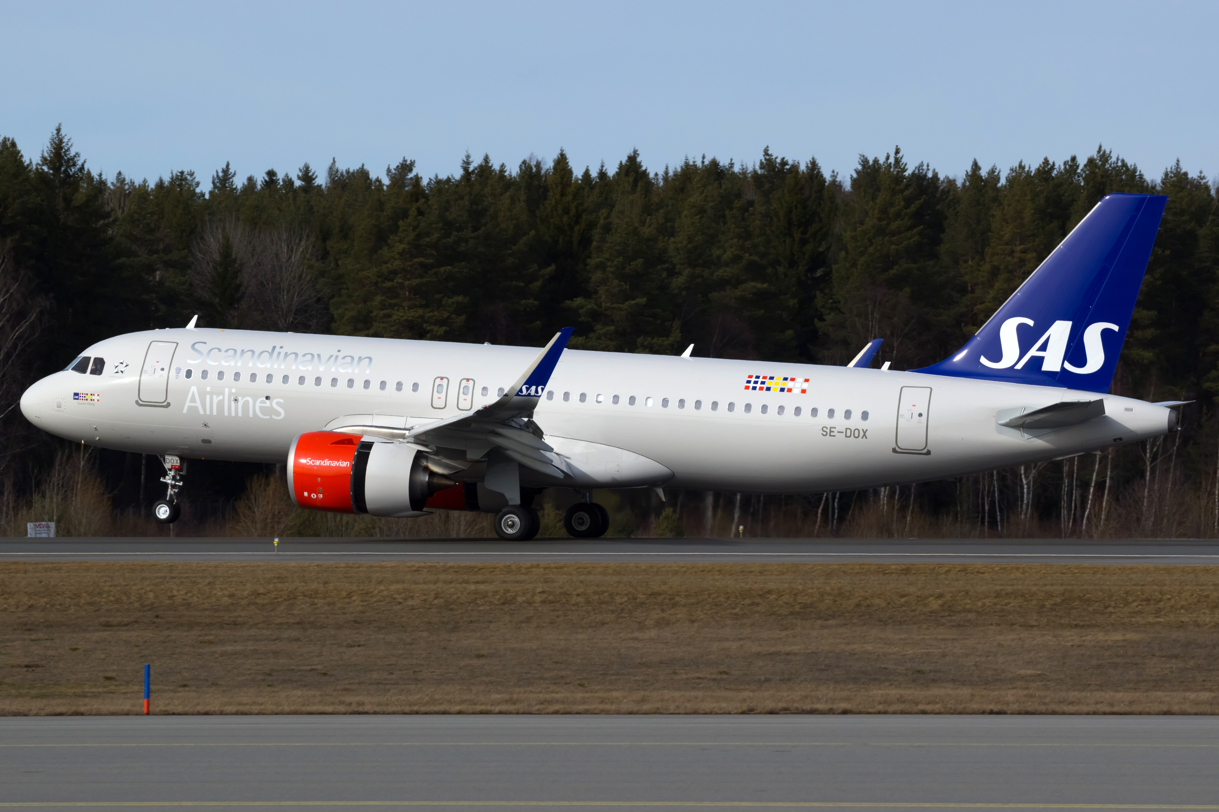 Airbus A320neo de SAS aterrando no aeroporto de Estocolmo-Arlanda.